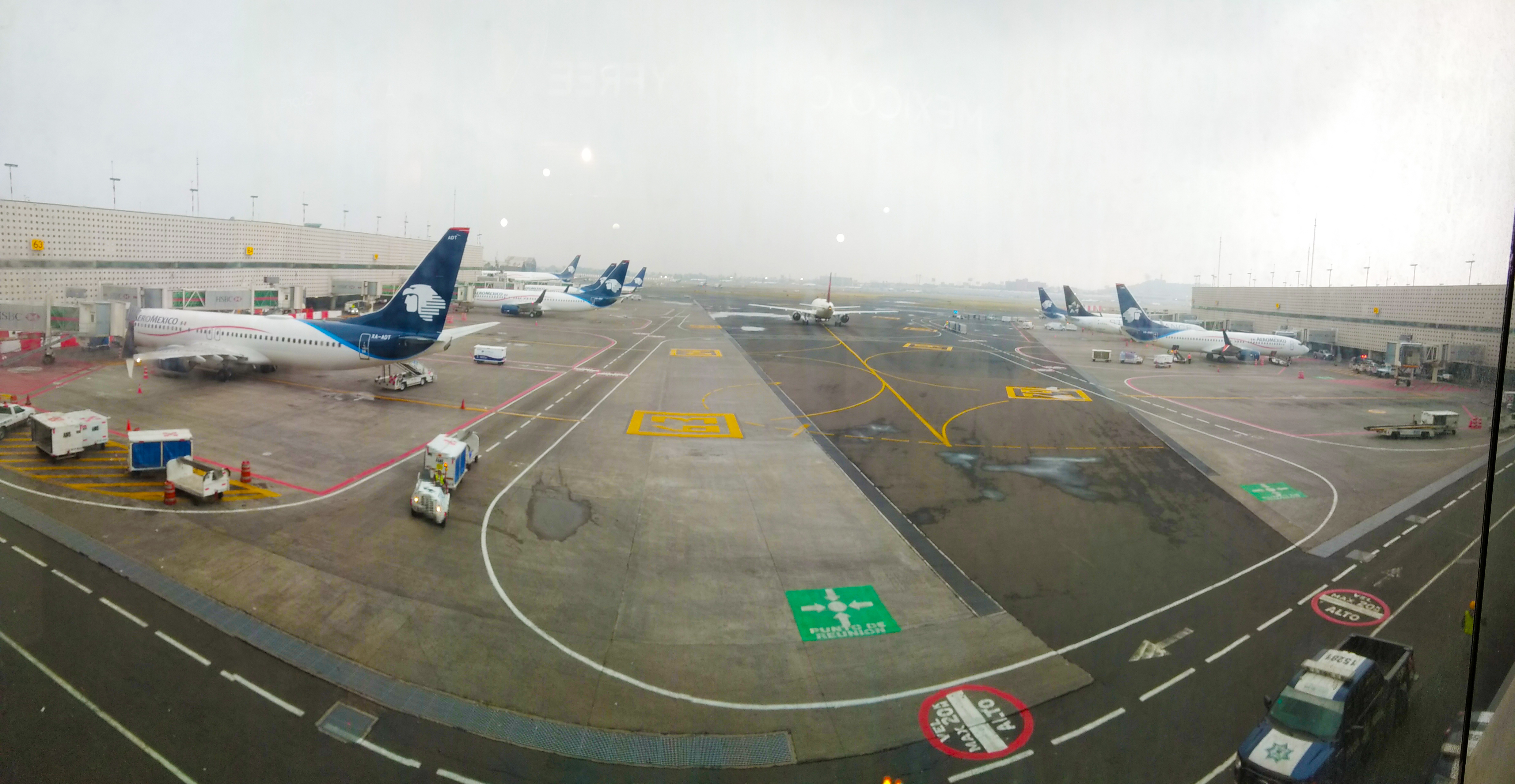 Aviones de Aeromexico y Copa